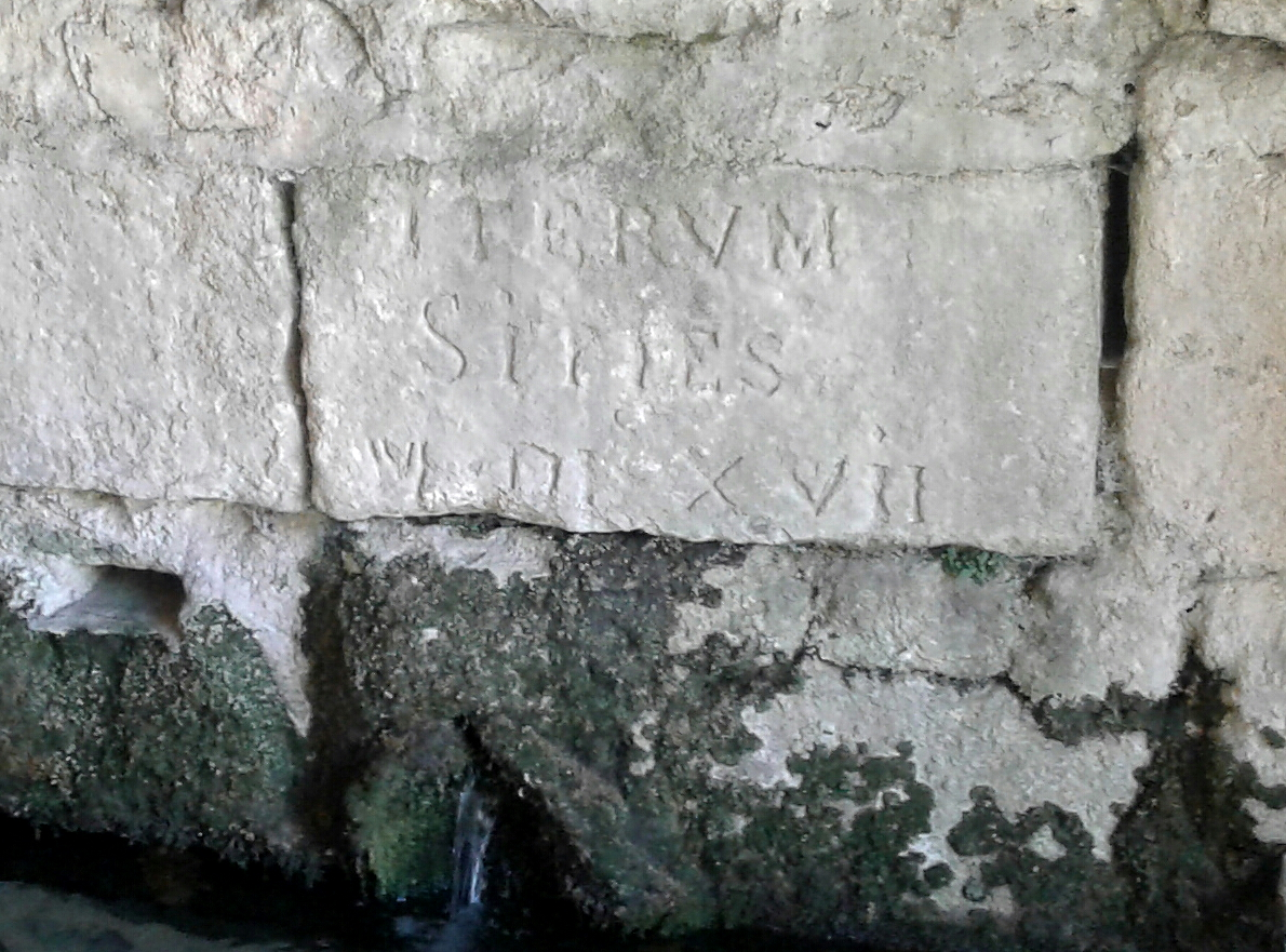 Inscription de la "Bonne fontaine", site de la Villa Betorrida, Forcalquier, Alpes de Haute-Provence